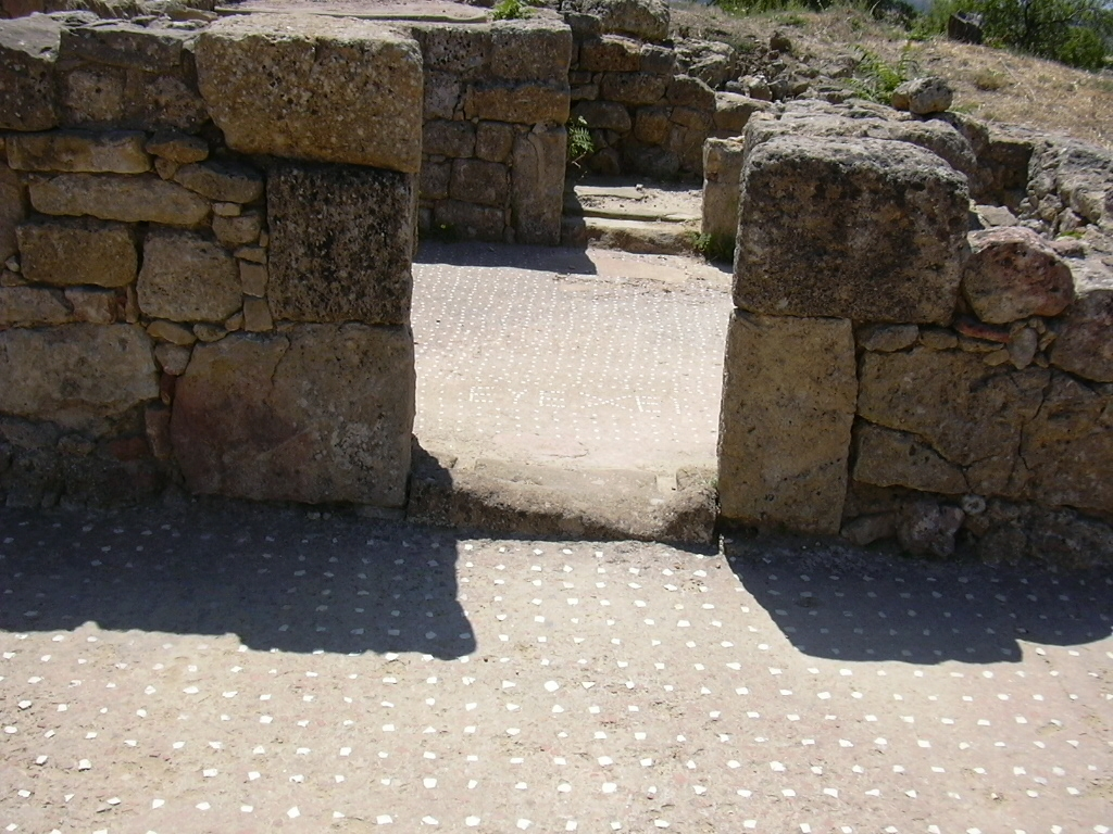 Morgantina - Sicilia: Casa del capitello dorico,chiamata anche "Del saluto" da questo mosaico inciso nel cocciopesto.